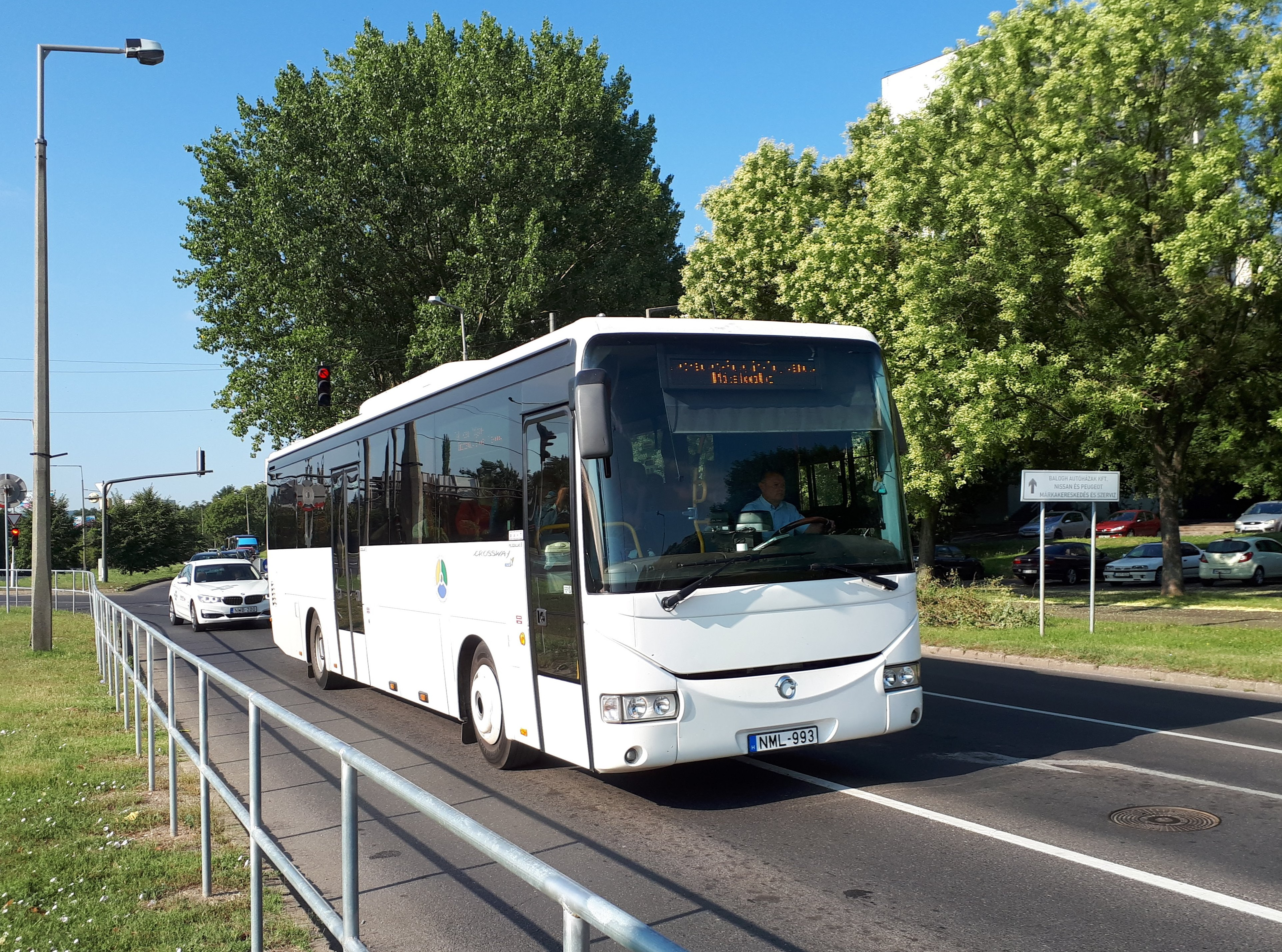 Az ÉMKK NML-993 rendszámú Irisbus Crossway 12M típusú busza Miskolcon, a 1372-es távolsági járaton.